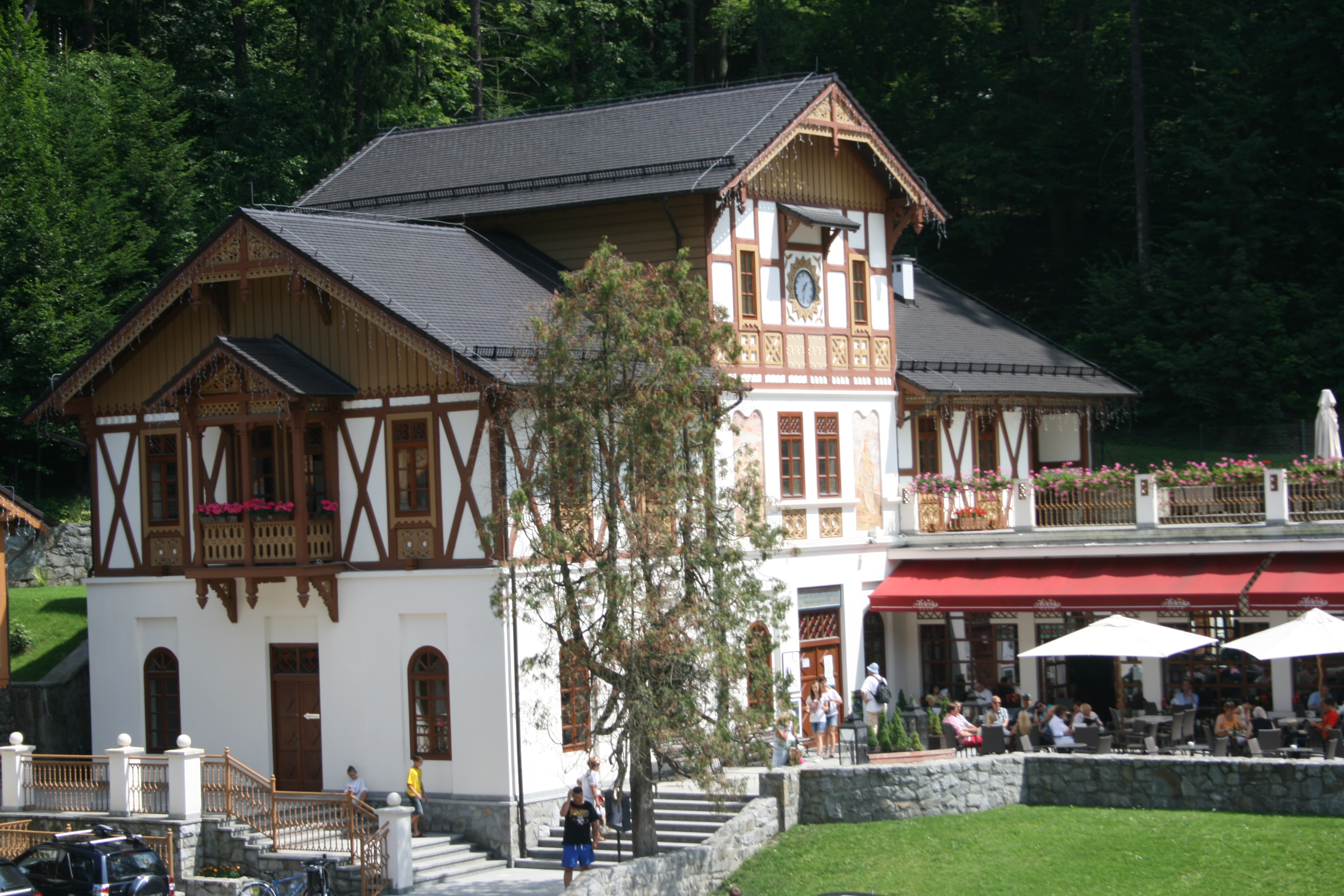 Szczawnica Dom Nad Zdrojami